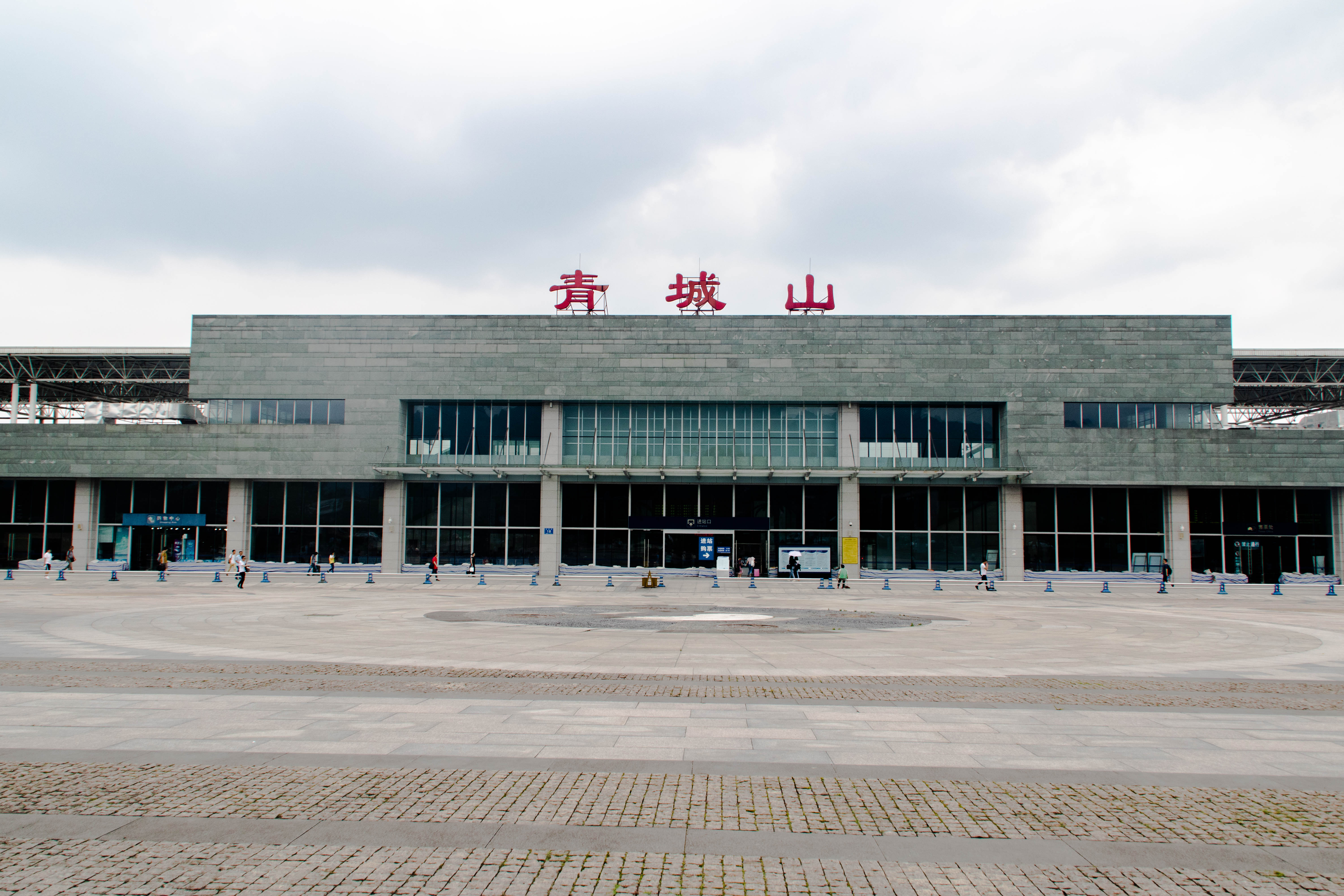 中文（中国大陆）: 青城山站站房